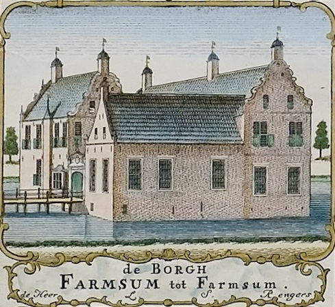 Borg Farmsum in Farmsum. Uitsnede uit de kaart van Theodorus Beckeringh uit 1781